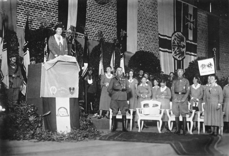 Luisenbund-Tagung in Potsdam. Kronprinzessin Cecilie am Rednerpult während der Kundgebung in der Messehalle. Aufnahme: [Atelier] E. Eichgrün; Scherl 29081-32 Abgebildete Personen: Preußen, Cecilie von: 1886-1954, verheiratet mit Kronprinz Wilhelm, Tochter Großherzog Friedrich Franz III. von Mecklenburg-Schwerin, Deutschland Preußen, Wilhelm von: 1882-1951, Kronprinz, Chef des Hauses Hohenzollern 1941-1951, Deutschland